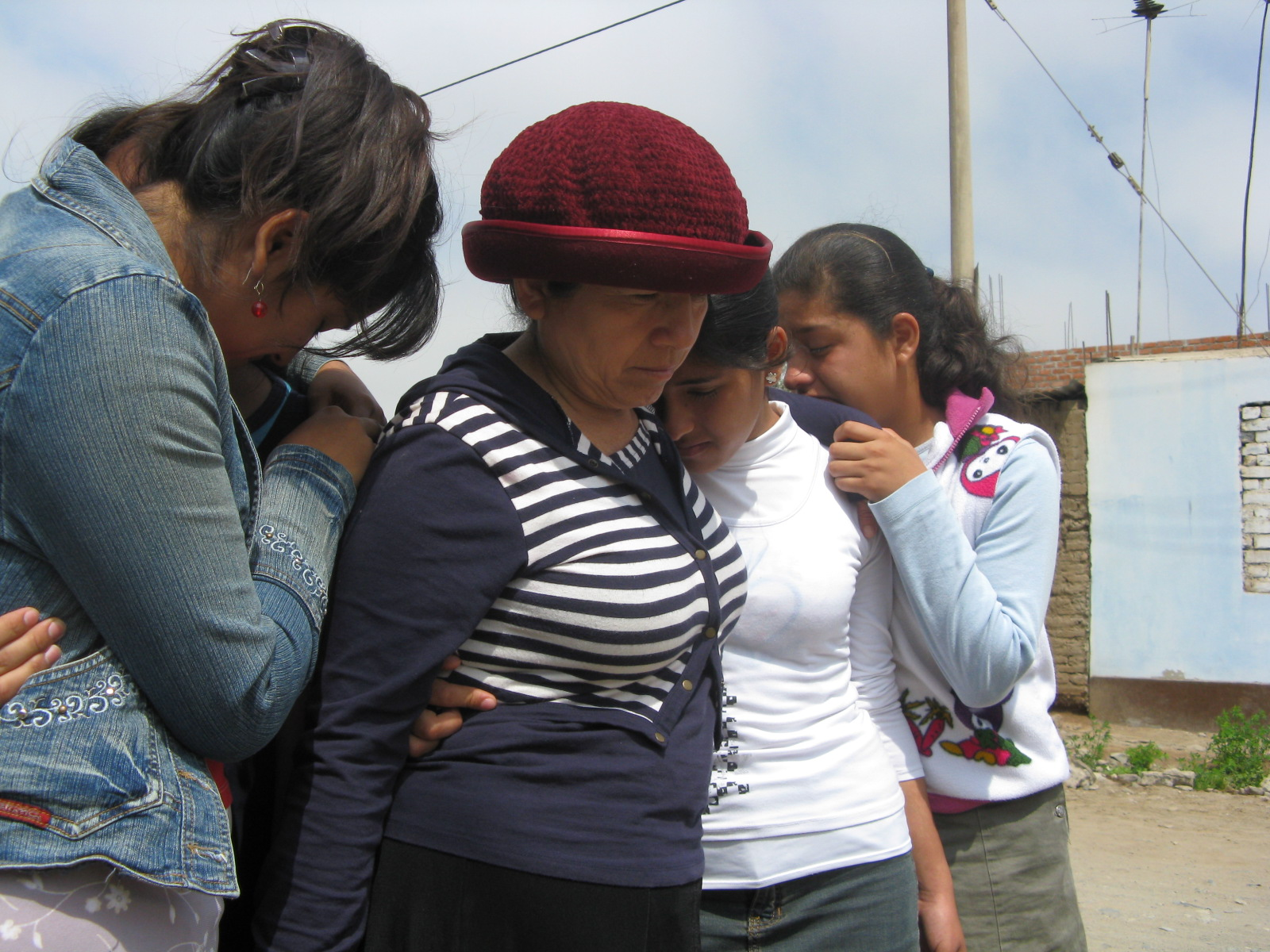 ולדרמה פלור ובנות בית דין